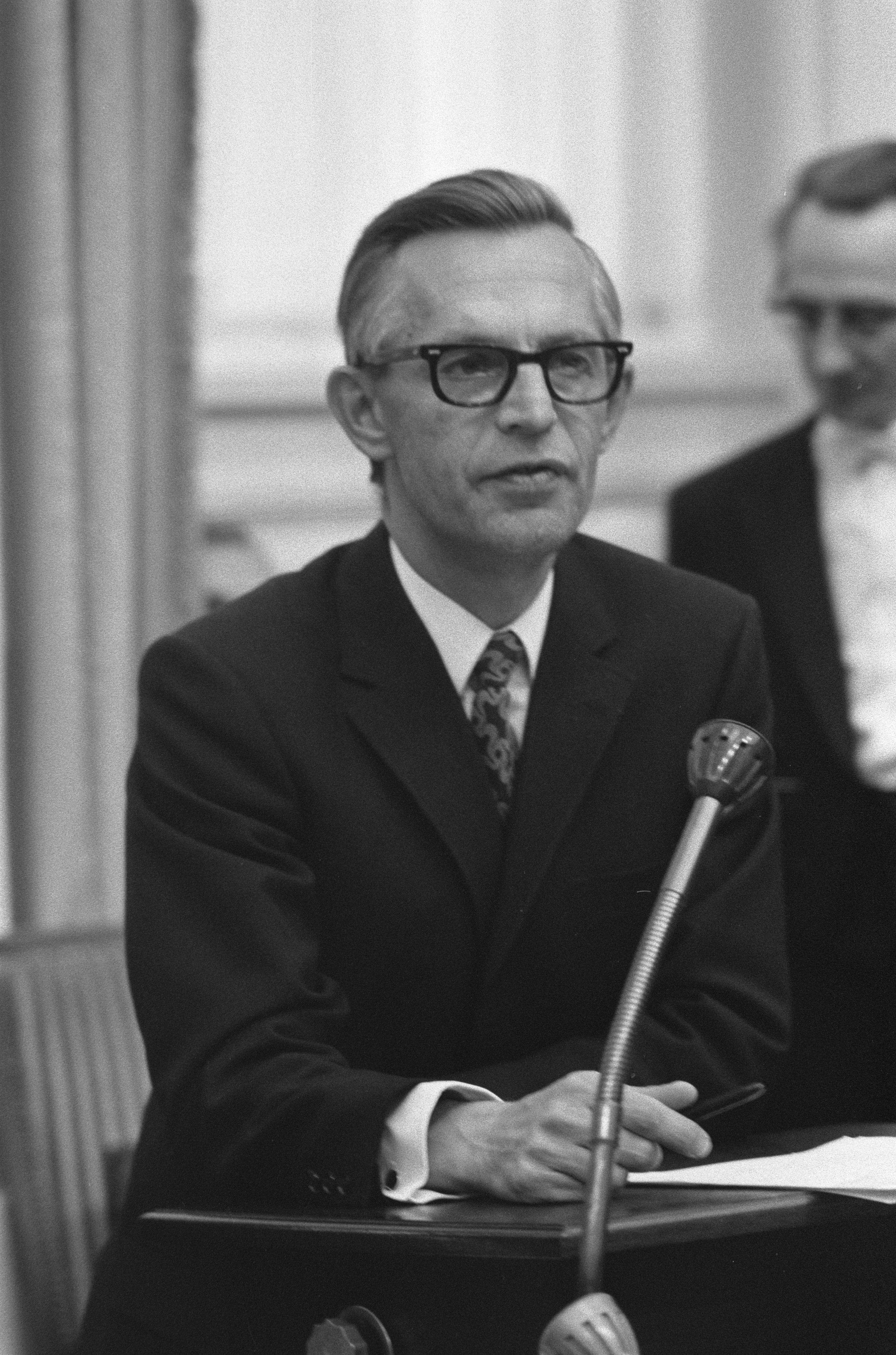 Collectie / Archief : Fotocollectie Anefo Reportage / Serie : [ onbekend ] Beschrijving : Regeringsantwoord op vragen over de Miljoenennota 1971; minister van Financien Nelissen aan het woord Datum : 14 oktober 1971 Locatie : Den Haag, Zuid-Holland Trefwoorden : ministers, overheidsbegrotingen, parlementaire debatten, politiek, portretten Persoonsnaam : Nelissen, R.J. Fotograaf : Verhoeff, Bert / Anefo Auteursrechthebbende : Nationaal Archief Materiaalsoort : Negatief (zwart/wit) Nummer archiefinventaris : bekijk toegang 2.24.01.05 Bestanddeelnummer : 925-0485